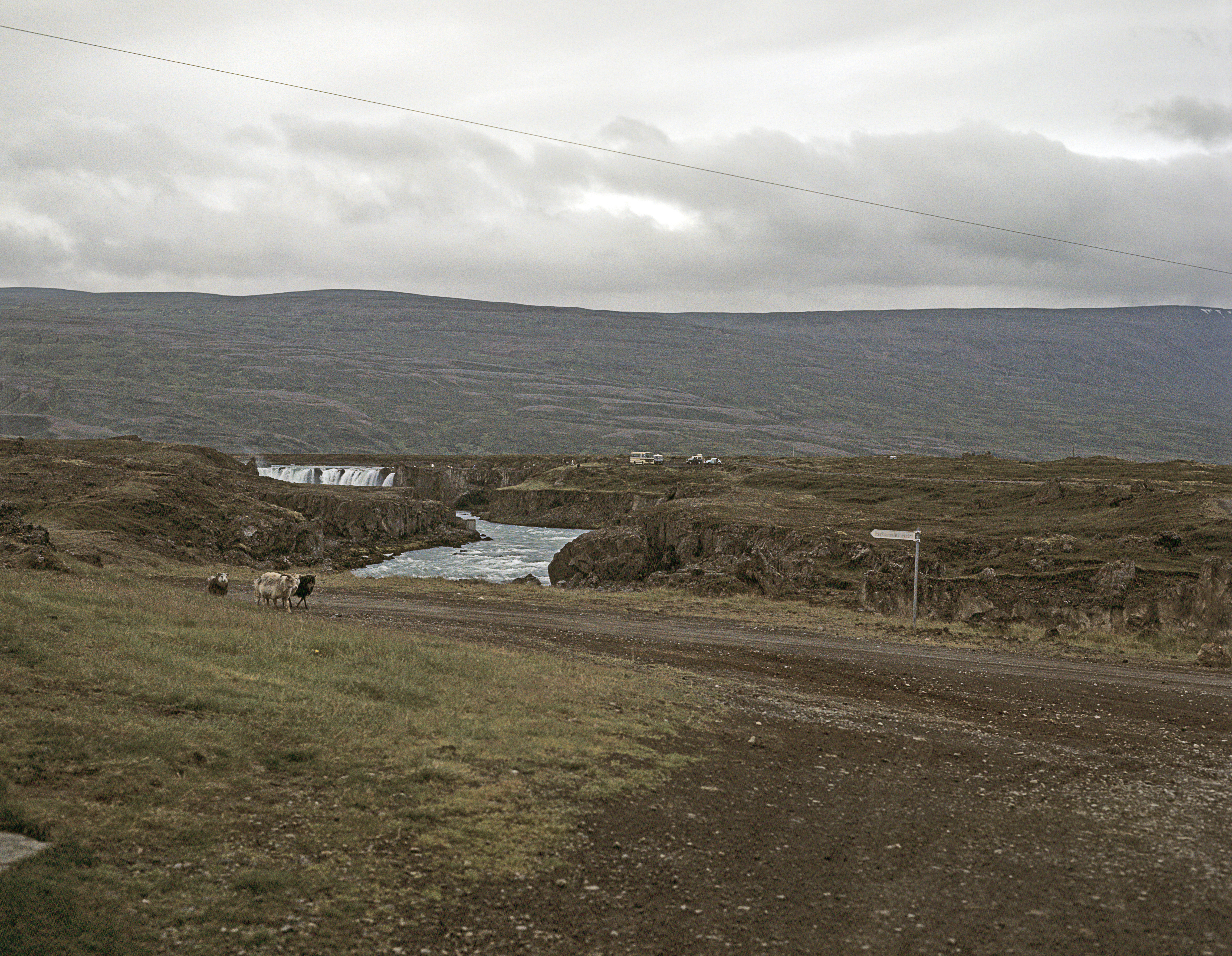 Bárðardalur mit Goðafoss.